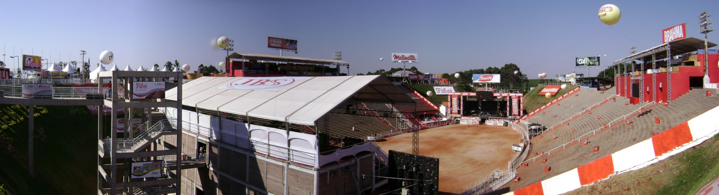 Panorâmica da Arena de Rodeio do Parque do Peão, em Barretos/SP.